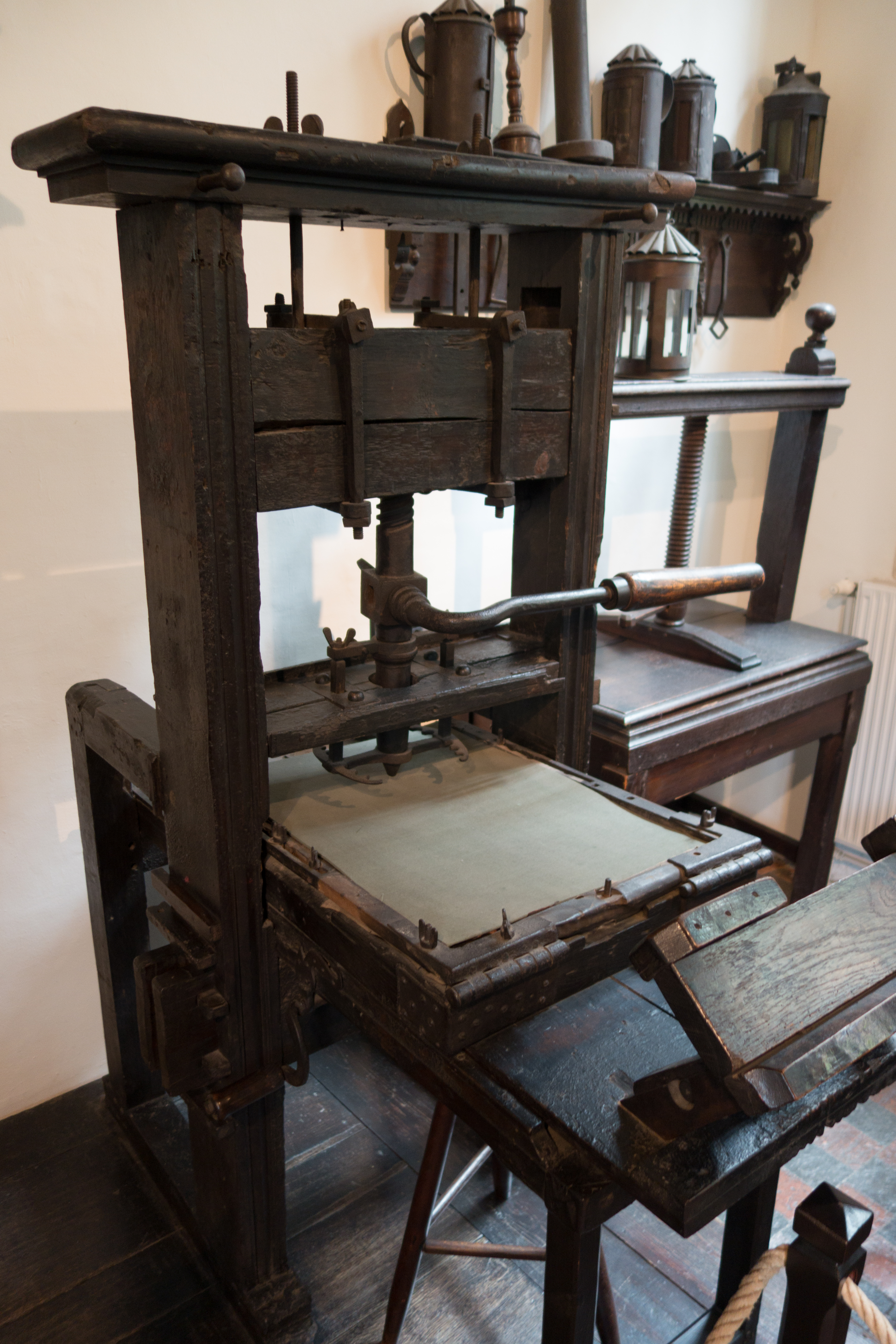 Belgium